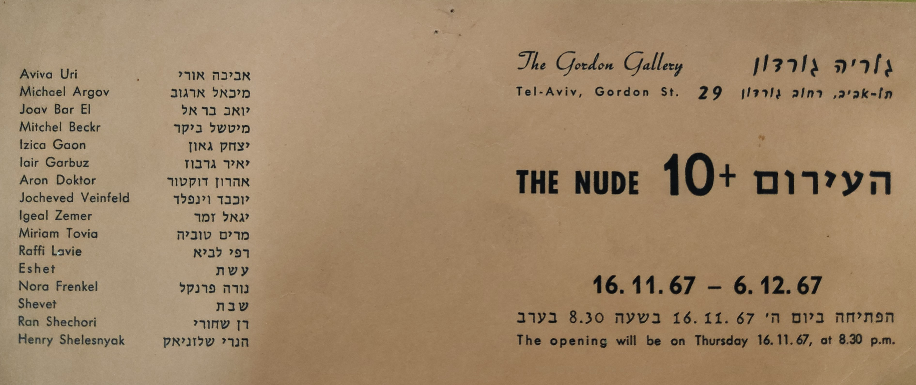 מתוך האוסף של בנו כלב